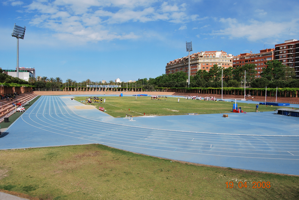 Polideportivo Estadio del Turia de Valencia